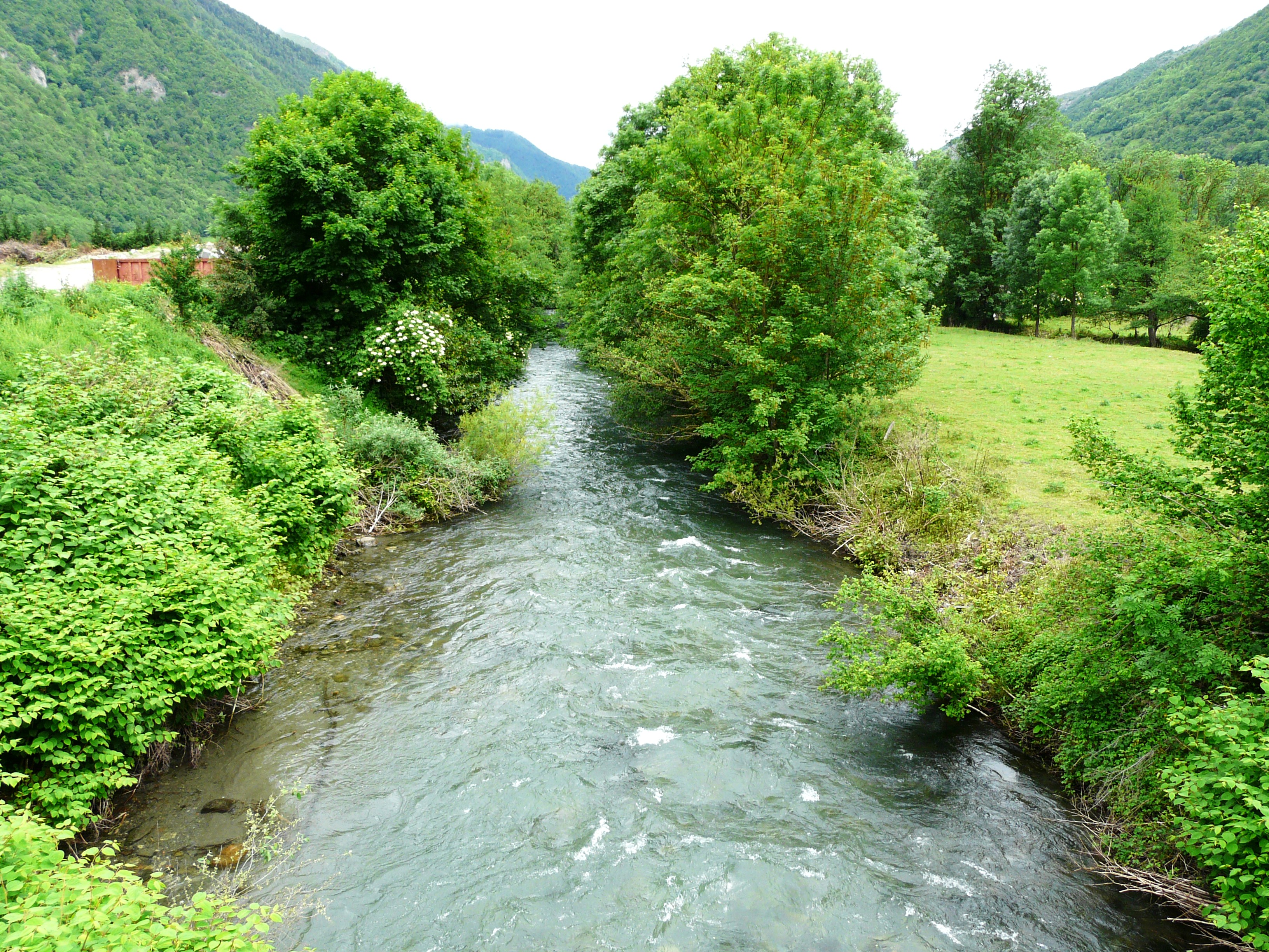 La Pique en aval du pont de la route départementale 46 en limites de Bagnères-de-Luchon (à gauche) et Juzet-de-Luchon (à droite), Haute-Garonne, France.